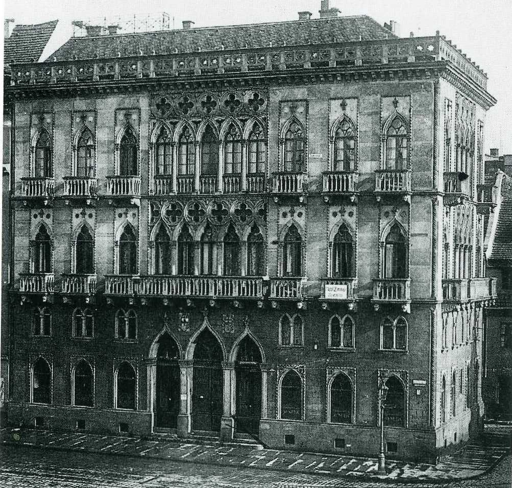 Venezianisches Haus in Dresden, Terrassenufer 3, erbaut um 1845, 1945 zerstört